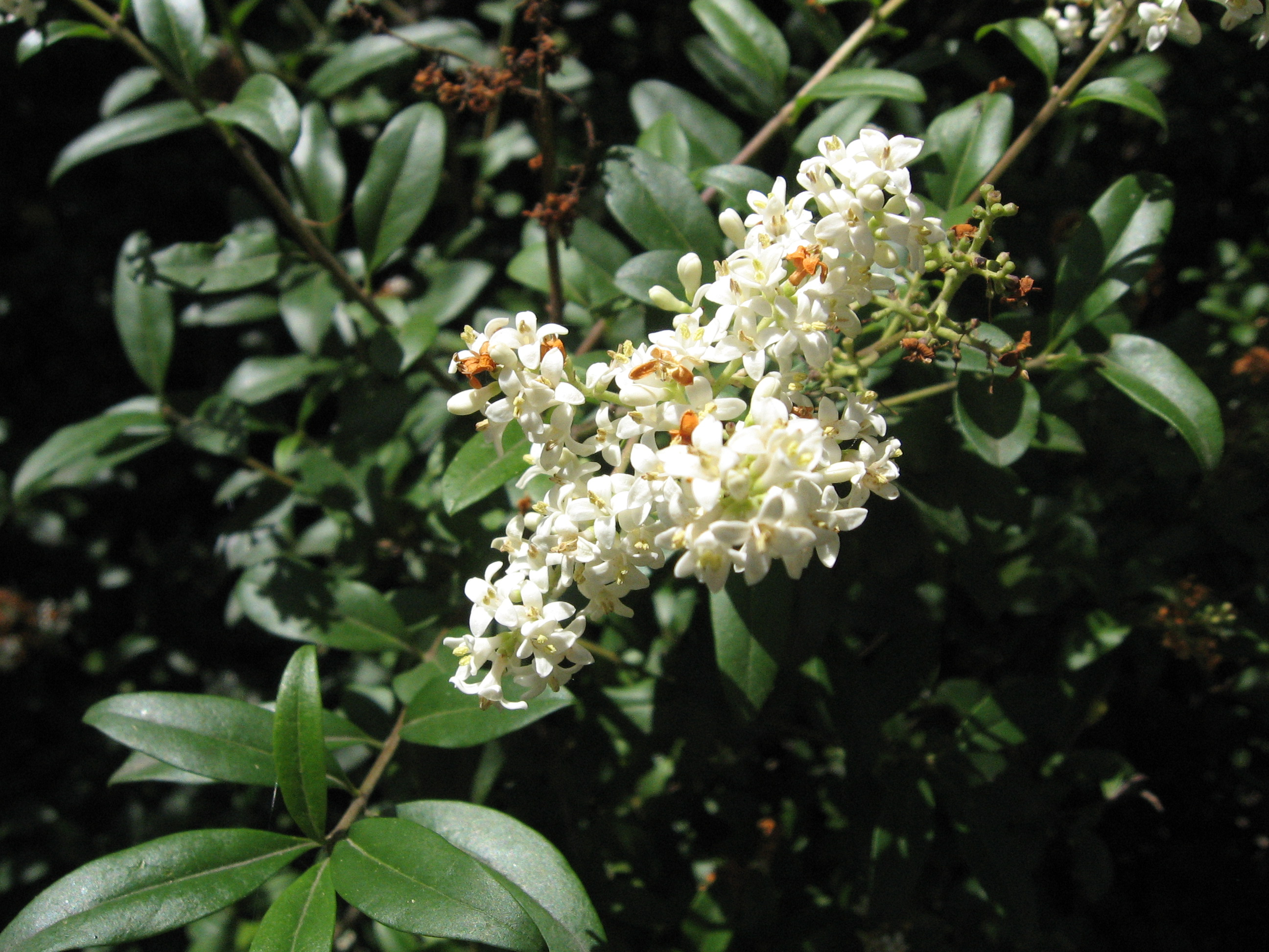 Ligustrum vulgare, aligustre. Real Jardín Botánico de Madrid.